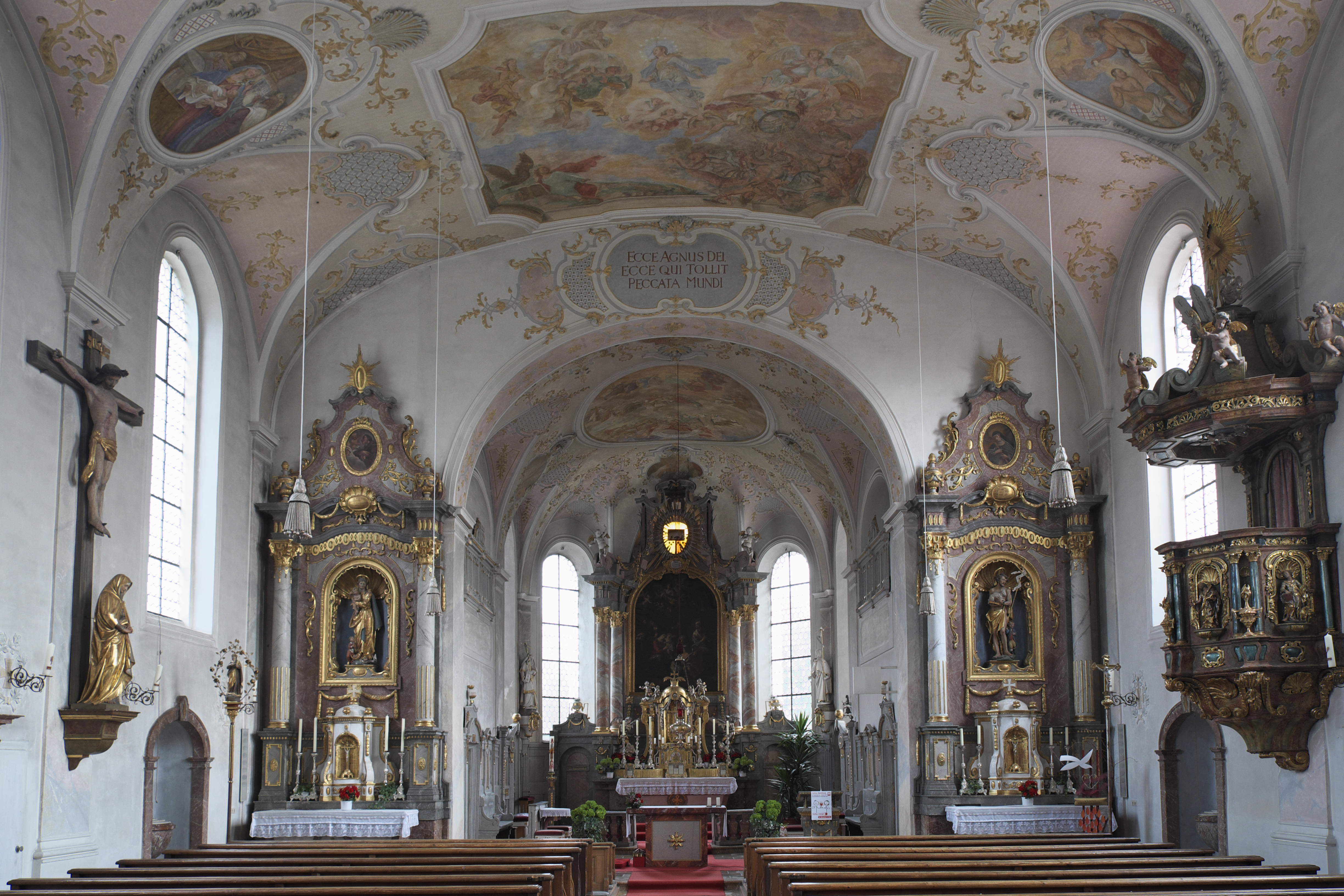 Katholische Pfarrkirche St. Johann Baptist in Asch (Fuchstal) im Landkreis Landsberg am Lech (Bayern/Deutschland), Innenraum